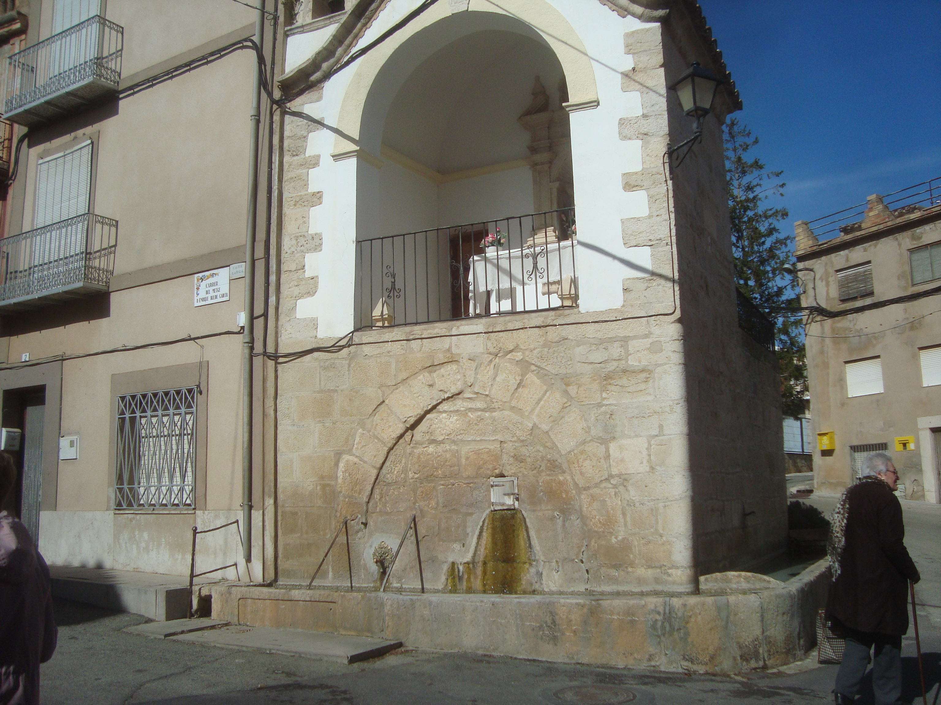 Font de Sant Vicent (Catí) 02.042-019.